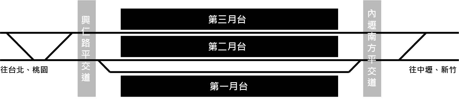 臺灣鐵路管理局內壢車站軌道配置。